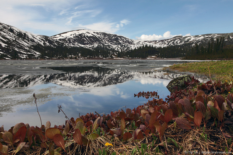 Ойское озеро, входит в состав 178 квартала Танзыбейского лесничества Ермаковского лесхоза. Озеро расположено на южном склоне хребта Кулумыс, отрог Западного Саяна, в бассейне Оленьей речки, Ермаковский район, Красноярский край. This image is related to the protected area of Russia number 2410085